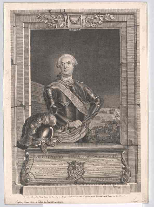 Louis Charles César Le Tellier, Duc d'Estrées, Marquis de Courtanvaux (1695-1771)